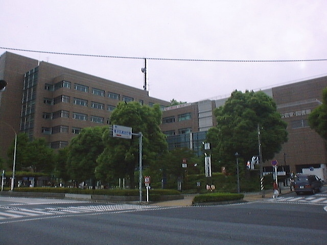 Isogo-ku Ward Office, Isogo-ku, Yokohama, Kanagawa, Japan (磯子区役所)